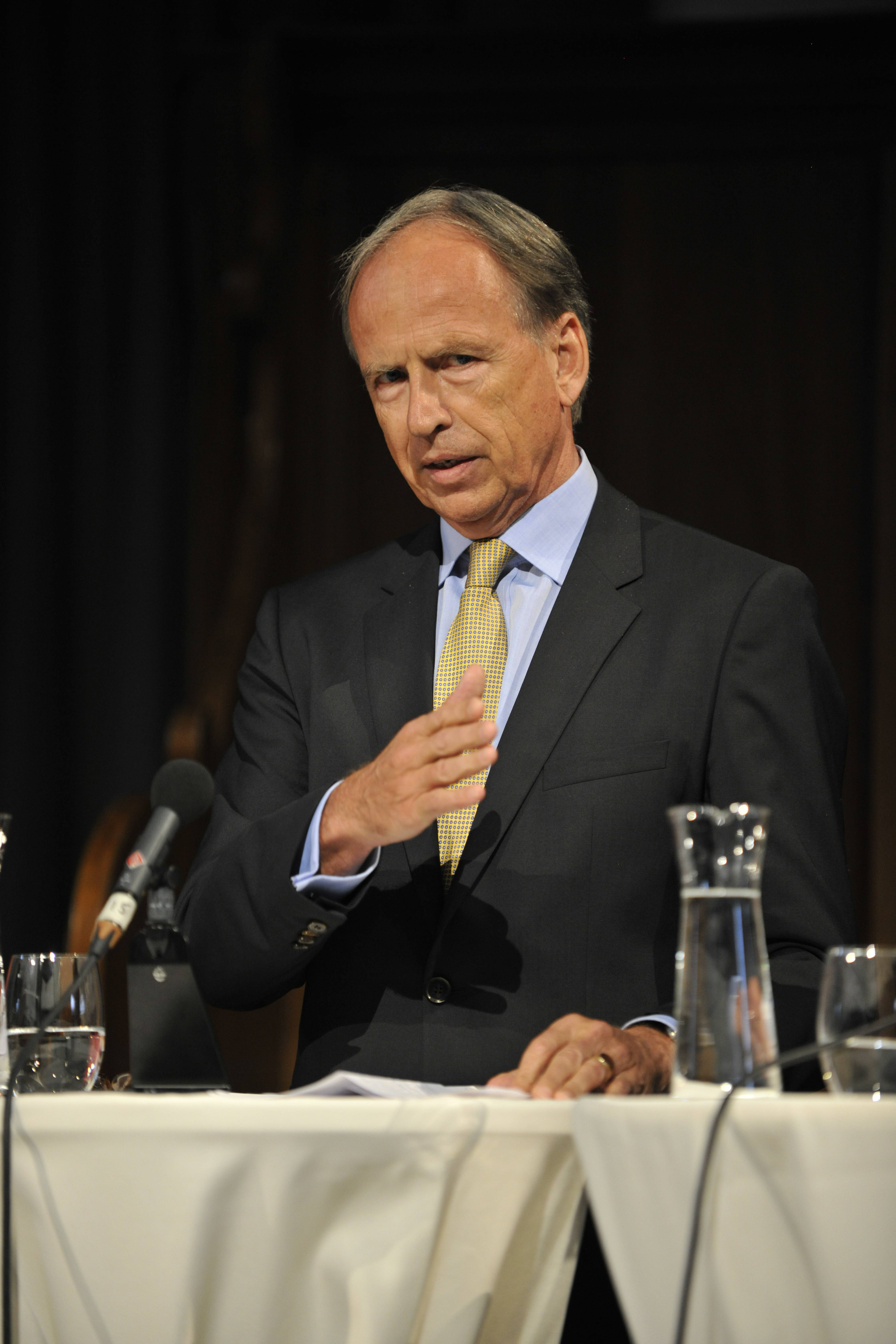 Mittwoch, 9. Oktober: Öffentliche Abschlussveranstaltung: Kirche St. Peter, Zürich Podiumsdiskussion mit Maja Ingold, Parlamentarierin, Winterthur Tim Guldimann, Schweizer Botschafter in Berlin Otto Lampe, Deutscher Botschafter in Bern Antonio Loprieno Rektor Universität Basel